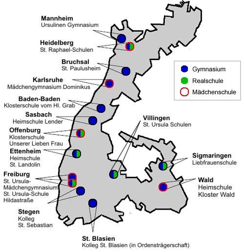 Übersichtskarte der Schulen in der Tägerschaft der Schulstiftung der Erzdiözese Freiburg